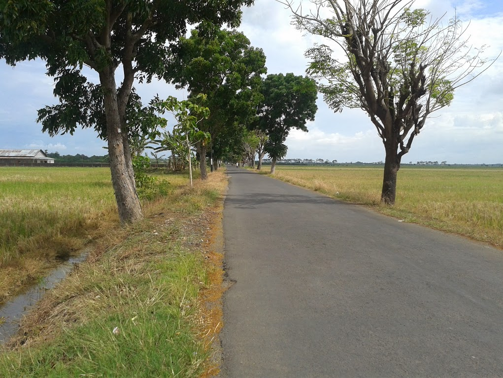 asemdoyong